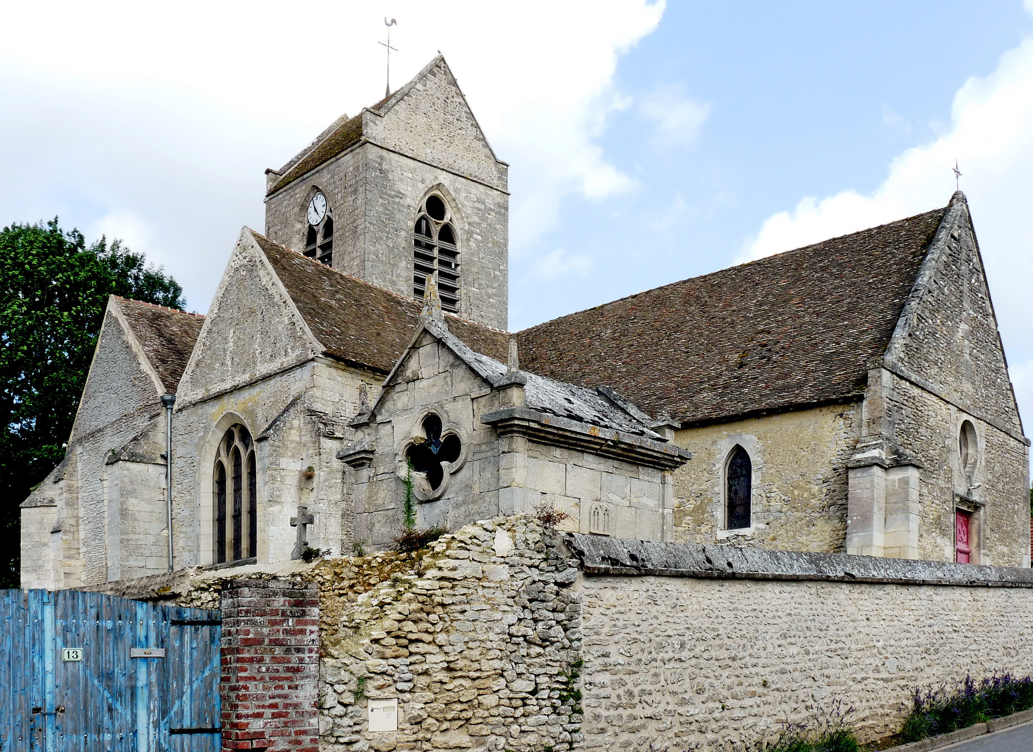 Église Saint-Maurice de Vesly .